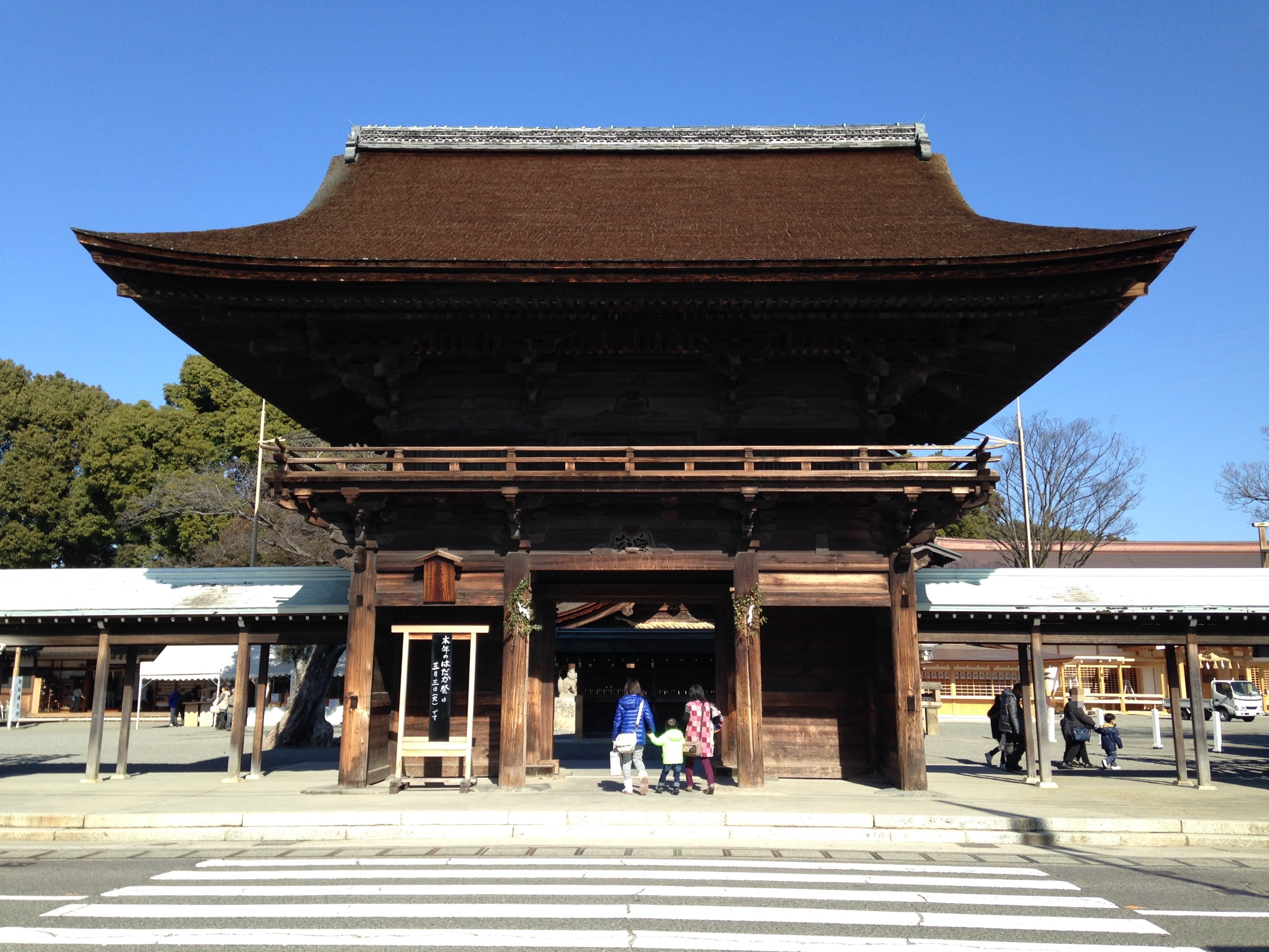 尾張大国霊神社の楼門